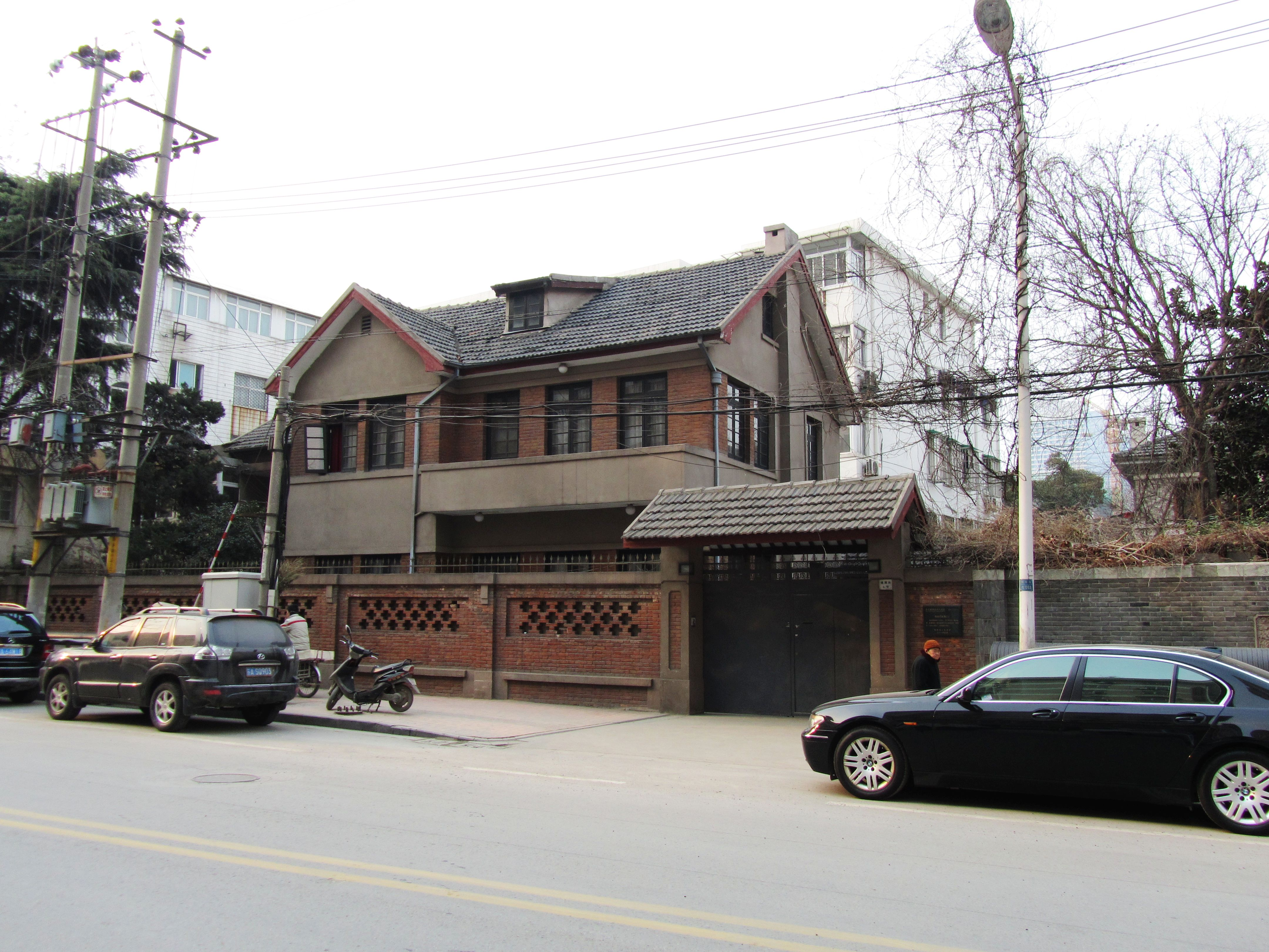 傅厚岗傅抱石故居。